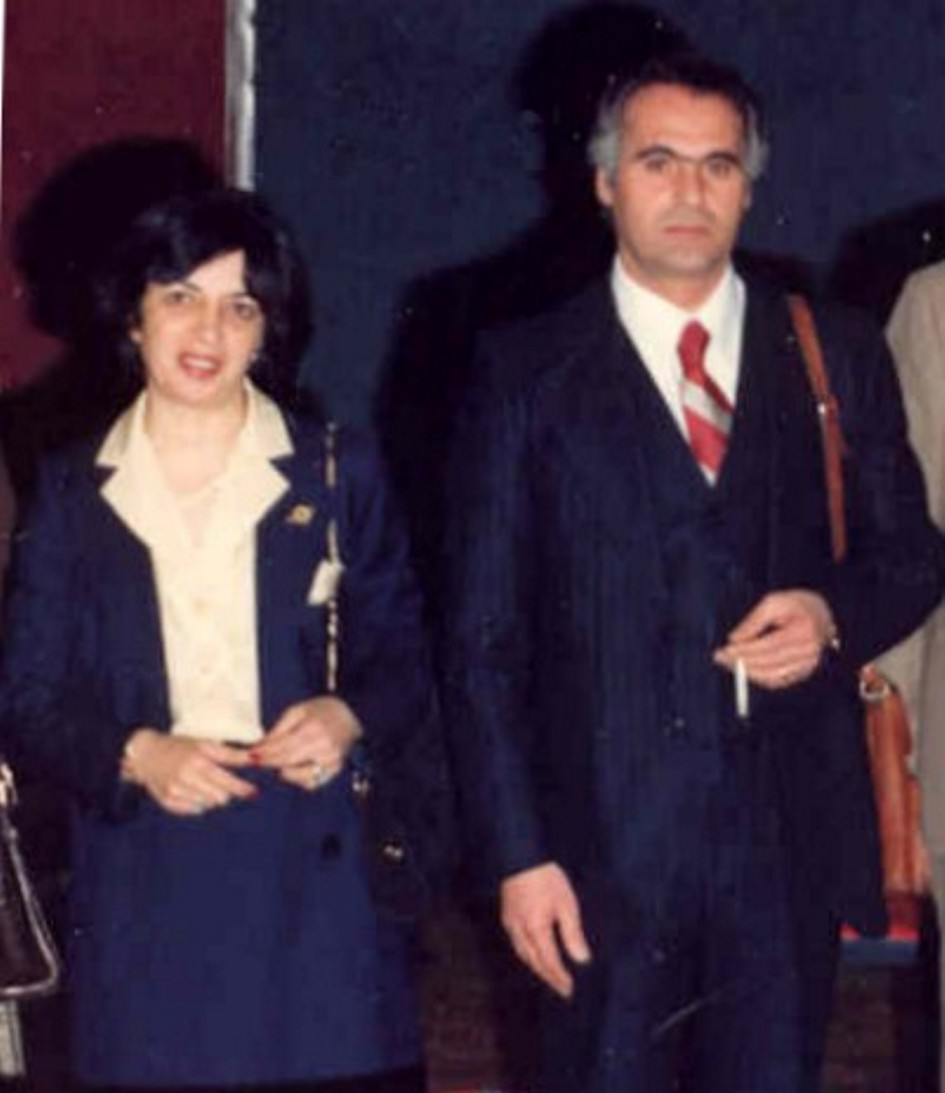 omar e maria